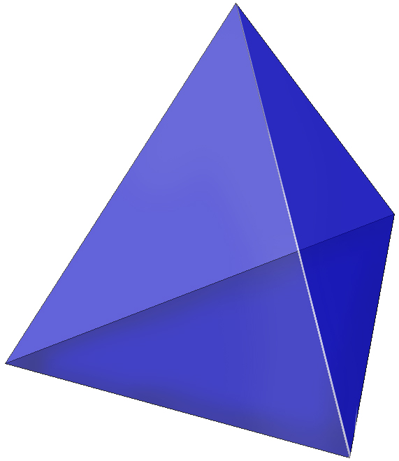 Ostrosłup, Autor: Ssawka Grafika udostępniona na licencji GFDL